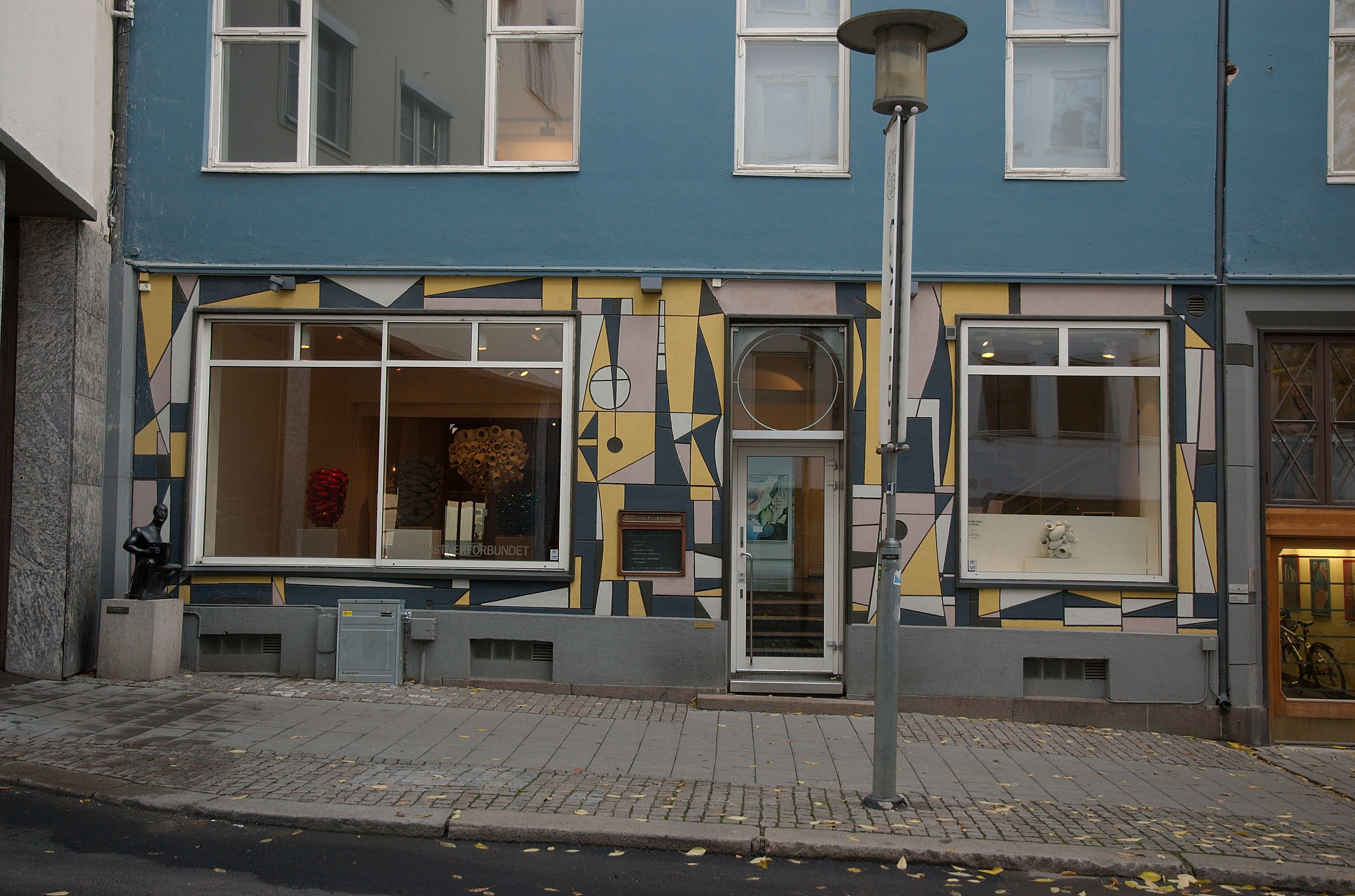 Kunstnerforbundet i Oslo.